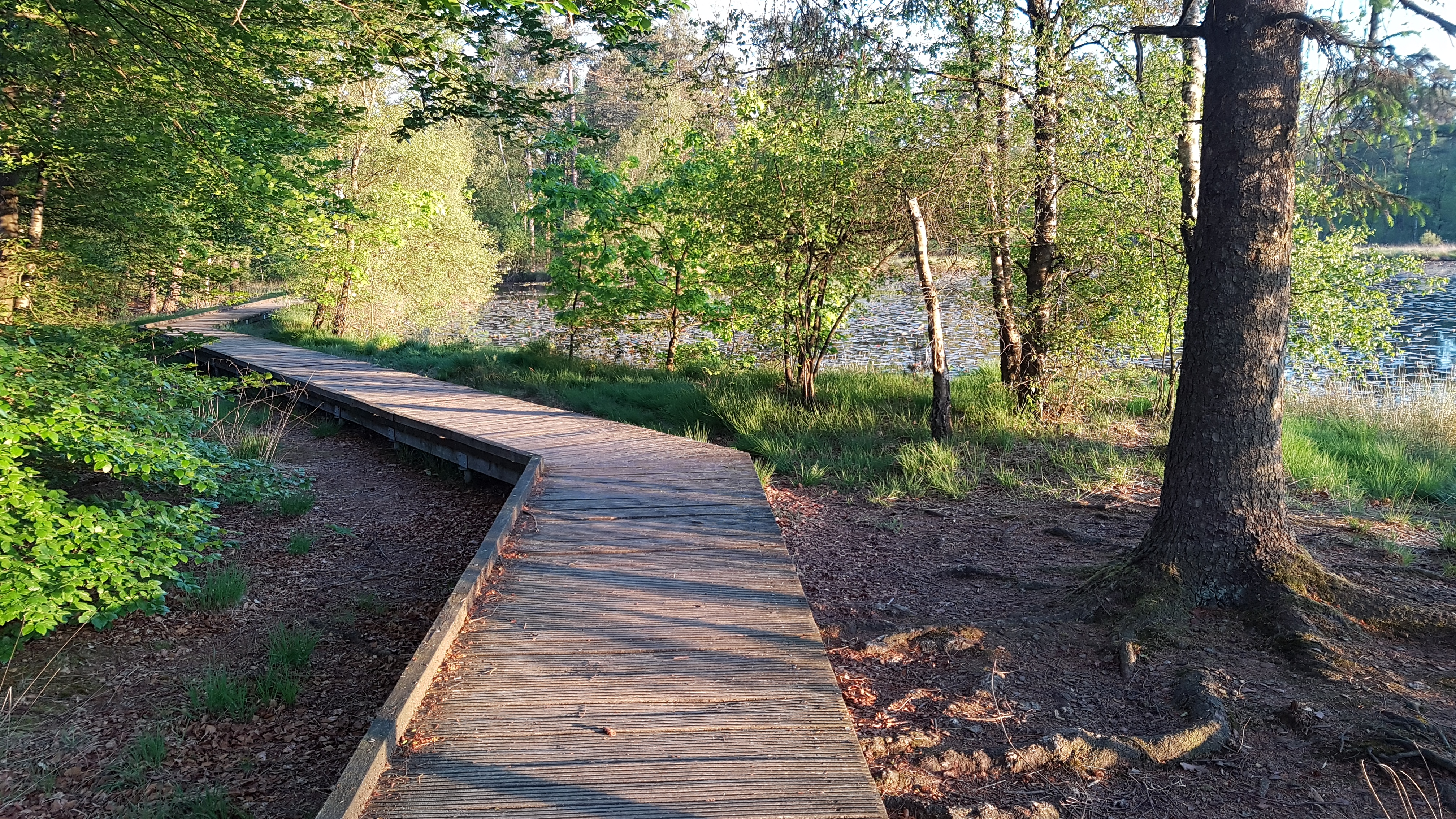 Aktuelles Bild des Bohlenweges aus dem Jahre 2017